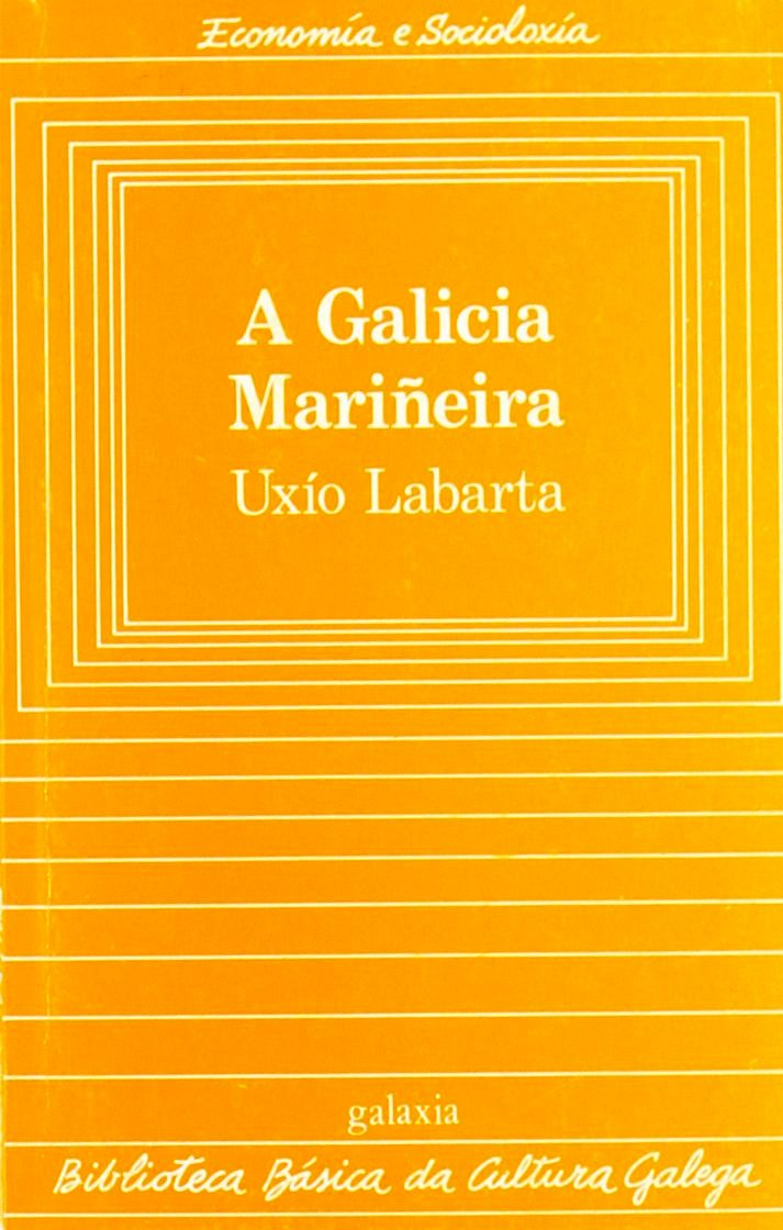 Biblioteca Básica da Cultura Galega, 23, A Galicia Mariñeira, Uxío Labarta.jpg